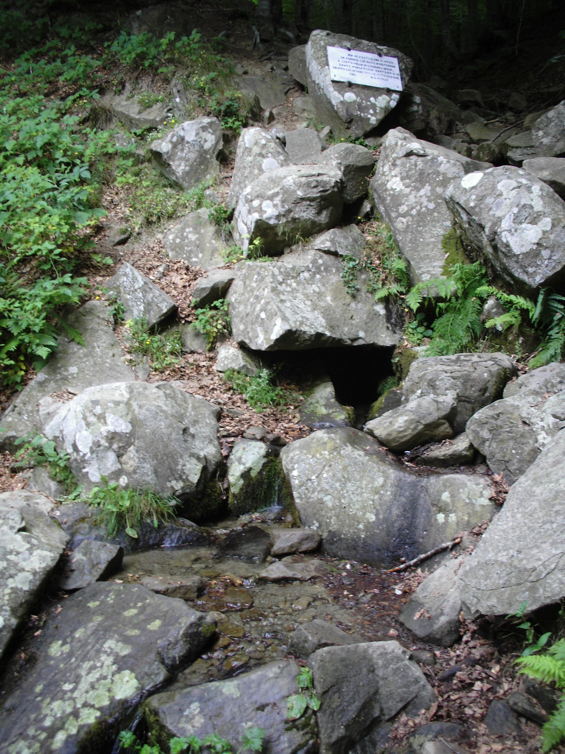 Monte Falterona, Capo d'arno, le sorgenti del fiume Arno